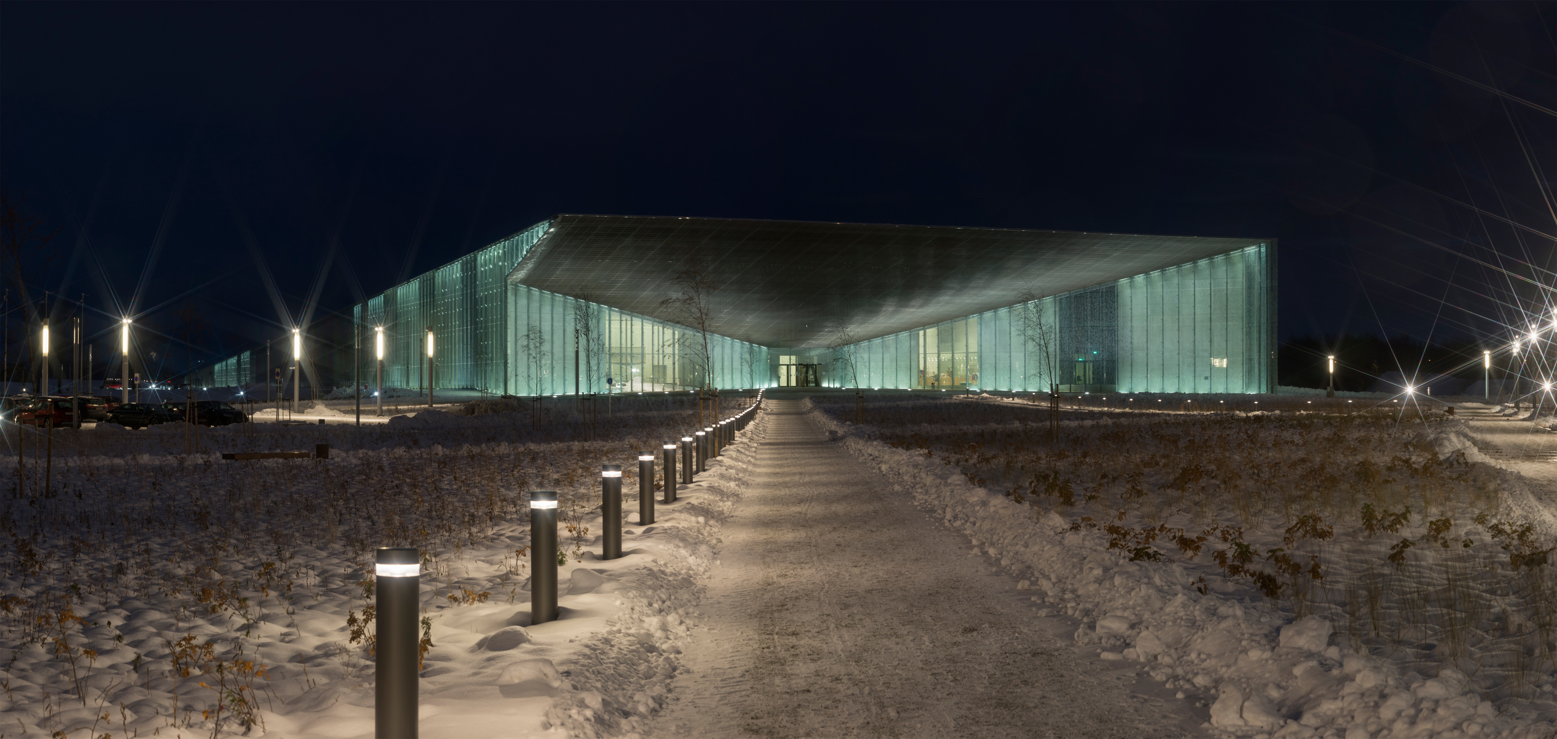 Eesti Rahva Muuseumi peahoone